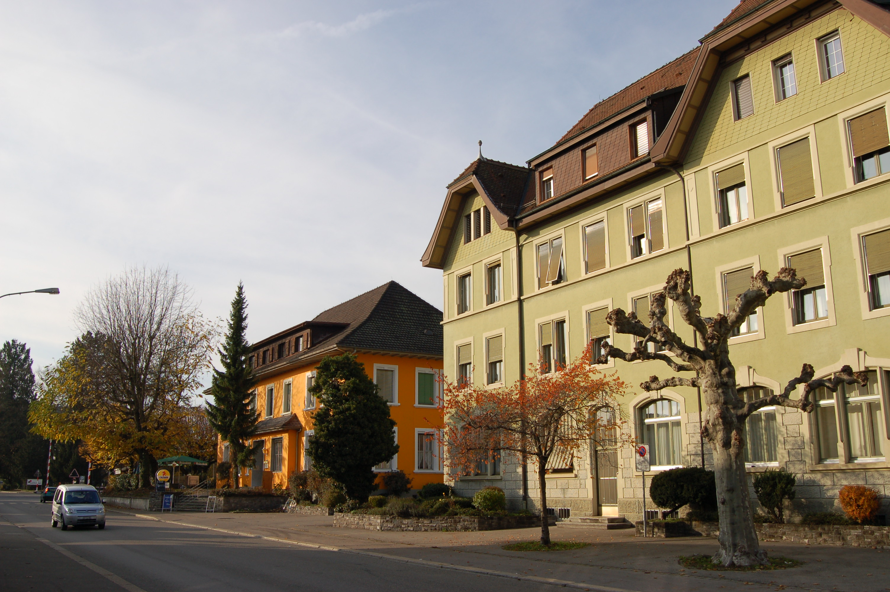 Kreisel beim Eisenhammer in Richtung Stahlwerk